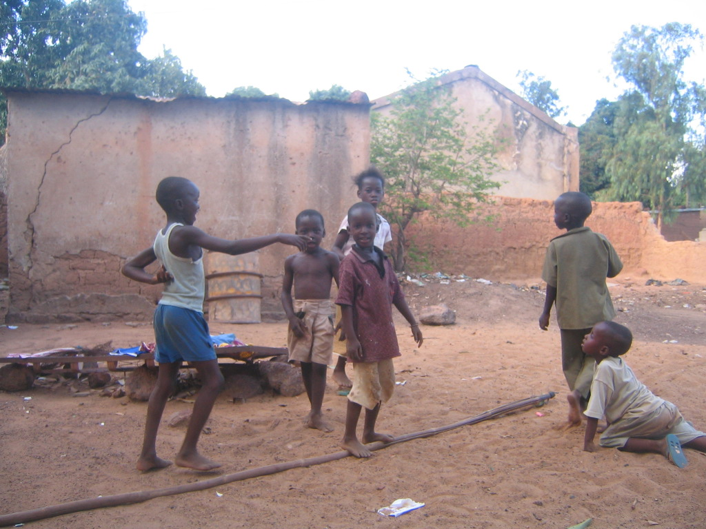 Taken by Guaka